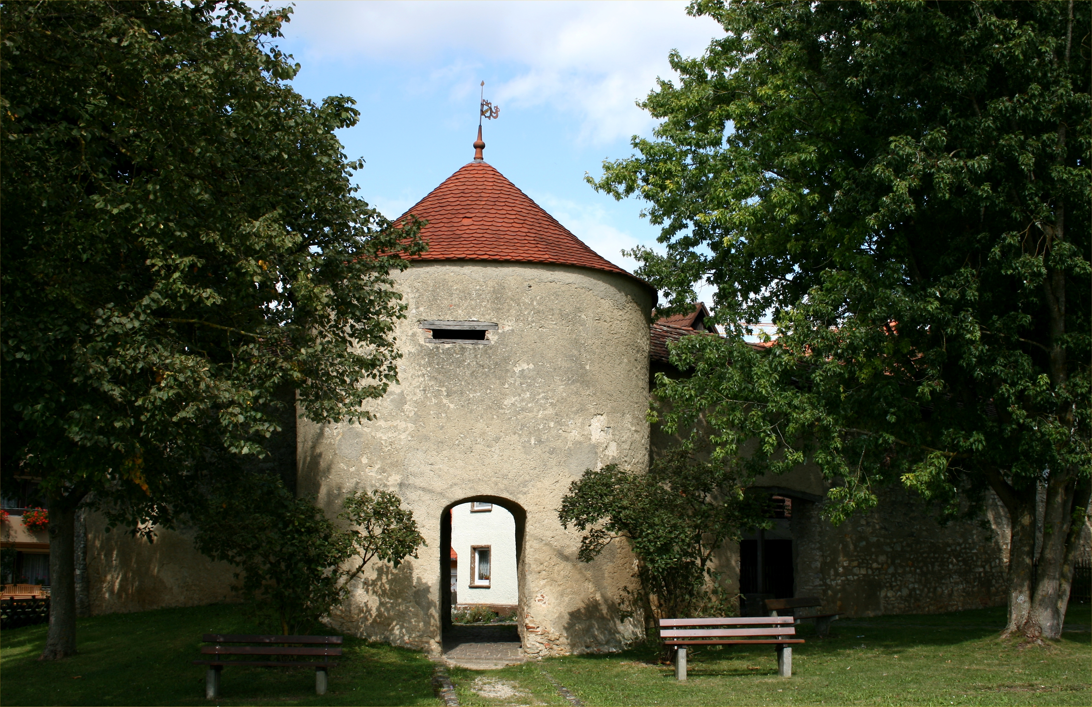 Der Kappenturm in Hayingen im Landkreis Reutlingen war Teil der ehemaligen Stadtbefestigung